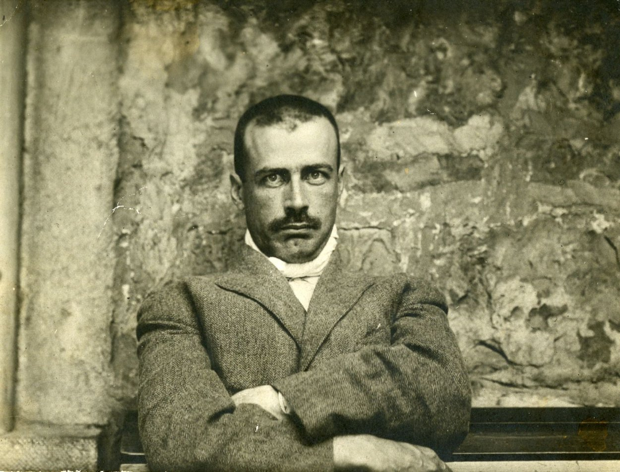 Émile Nelligan à l'asile Saint-Benoît-Joseph-Labre Émile Nelligan âgé de 40 ans